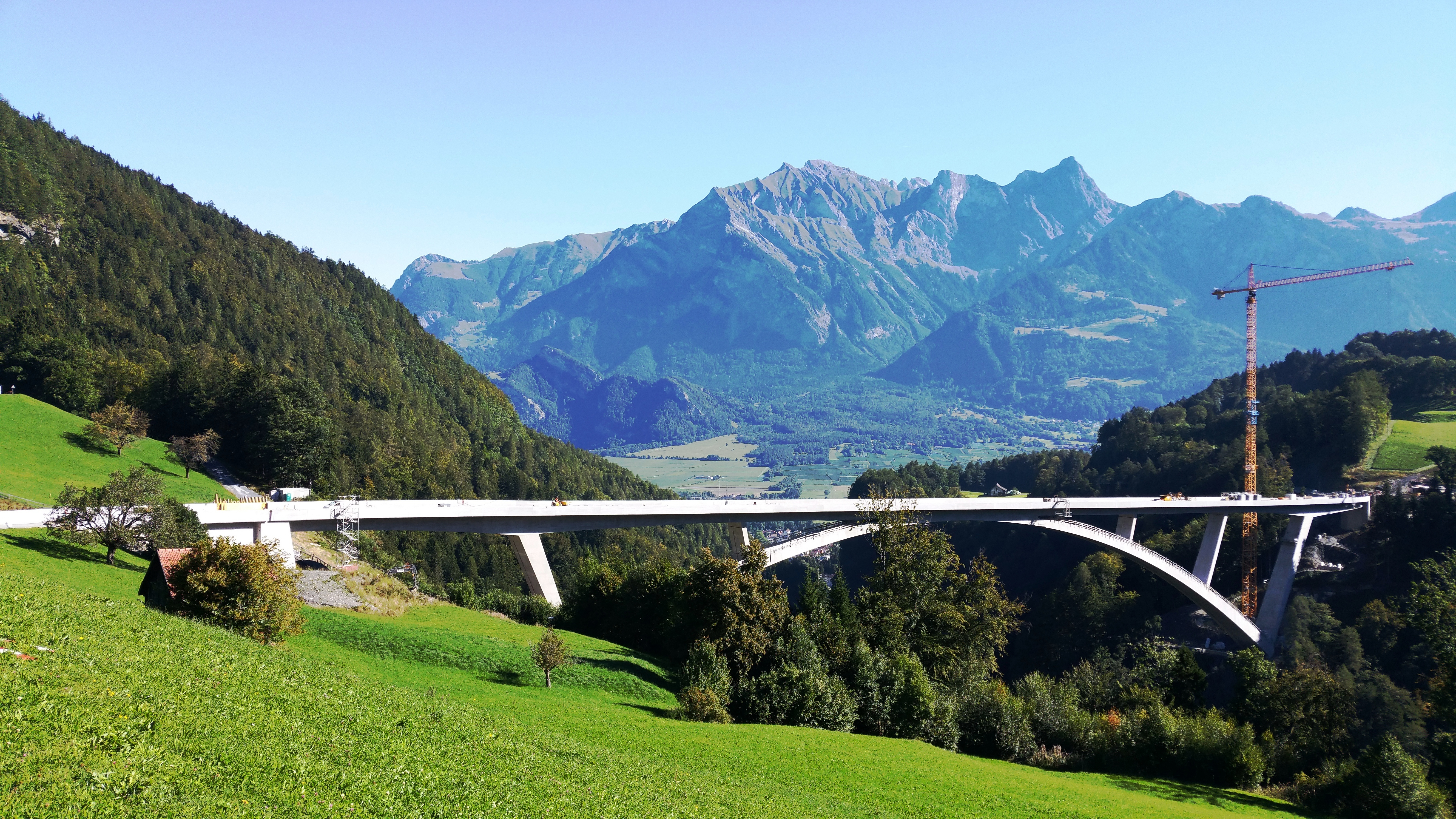 Der Kran auf der Valenser Seite wurde bereits abmontiert. Die Erstellung der Fahrbahnplatte ist beendet, die Montage der Leitmauern ist weit fortgeschritten und die ersten Umgebungsarbeiten sind bereits aufgenommen worden.